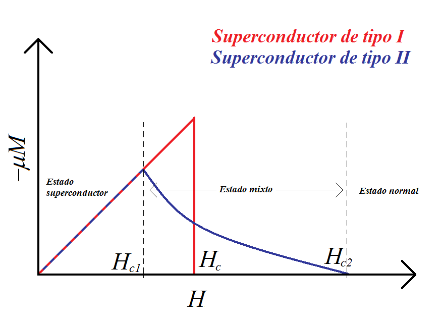 Cuando el superconductor es de tipo I el cambio de estado entre el estado normal y el superconductor es de primer orden (es decir, se trata de un cambio brusco para un campo magnético Hc). Si es de tipo II, el cambio de estado es de segundo orden (con lo que en lugar de haber una discontinuidad para un campo Hc, tendremos que pasa por un estado mixto entre Hc1 y Hc2).